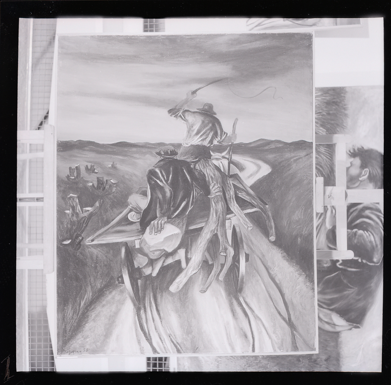 Servizio fotografico : Italia, 1960 / Paolo Monti. - Buste: 11, Fototipi: 11 : Negativo b/n, gelatina bromuro d'argento/ pellicola ; 6x6, 6x8. - ((Serie costituita da 11 buste di negativi identificati con i nn.: 15183, 15184, 15185, 15186, 15187, 15188, 15189, 15190, 15191, 15192, 15193, e tenute insieme da una graffetta. - Sulla busta identificata con il n. 15183 iscrizione didascalica manoscritta a penna: "Zigaina".